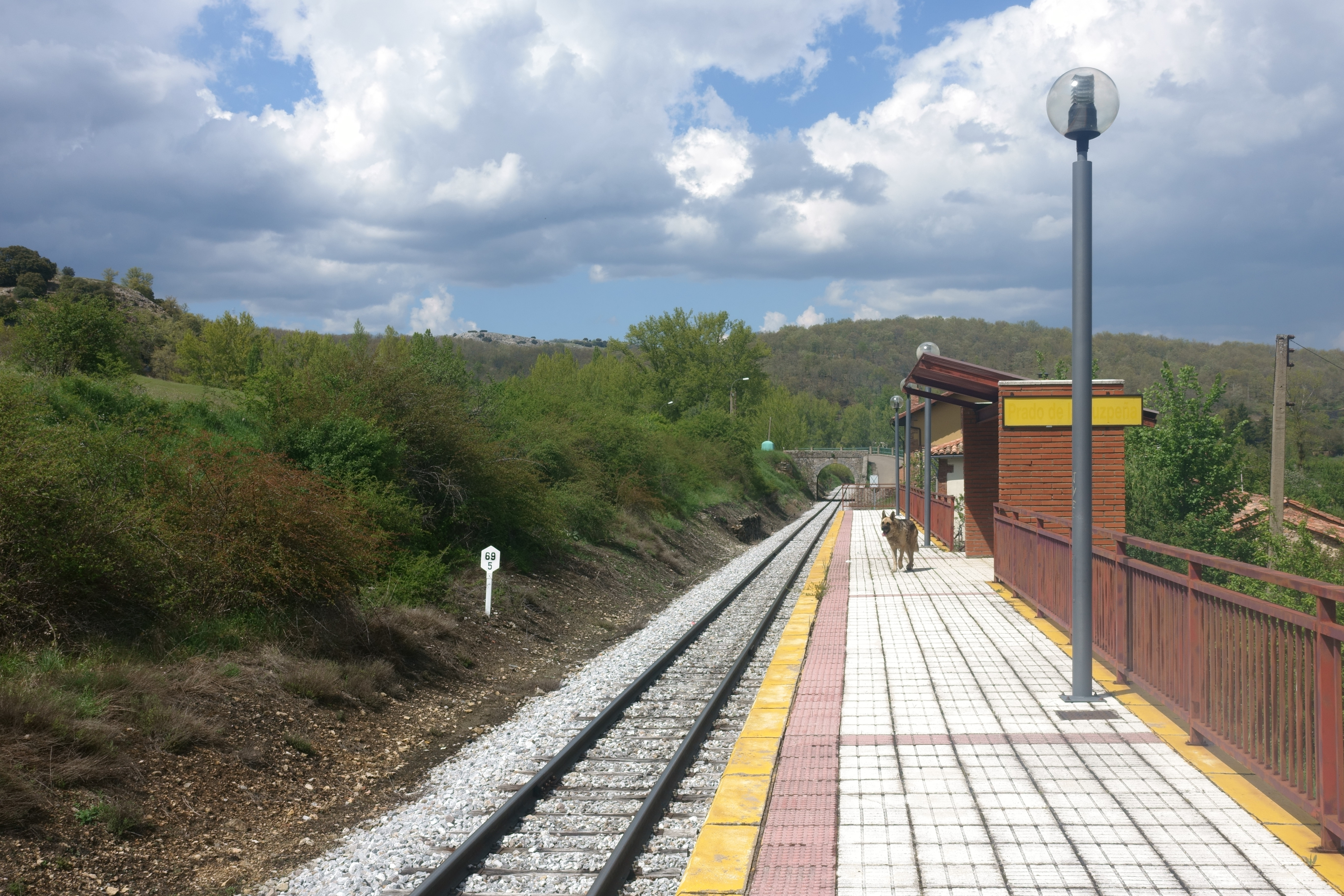 Estación de tren de Prado de la Guzpeña (León, España).